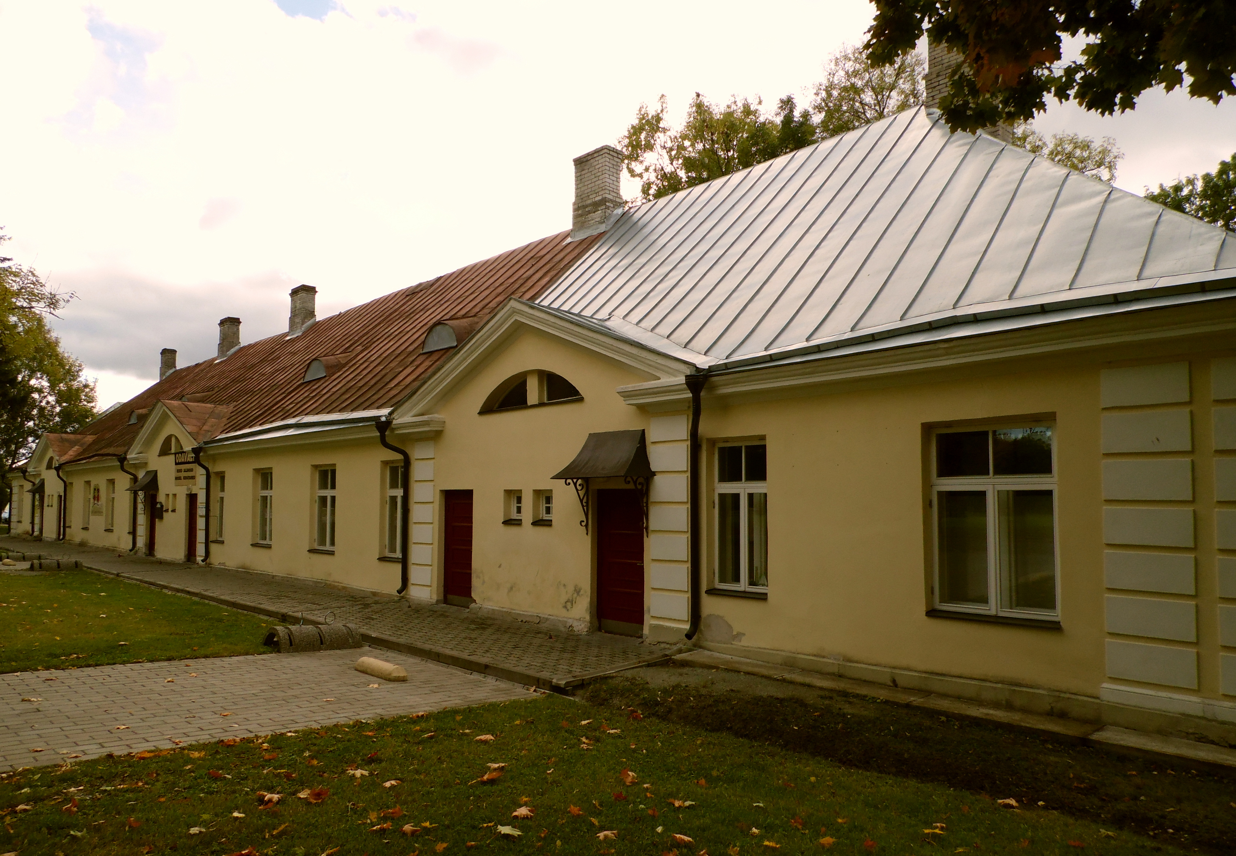 Uuemõisa mõisa teenijatemaja. Lossi tee 1 Uuemõisa alevik Ridala vald Läänemaa